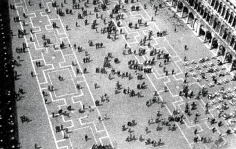 documentario Piazza San Marco - Francesco Pasinetti, 1947 - prod. Filmeuropa